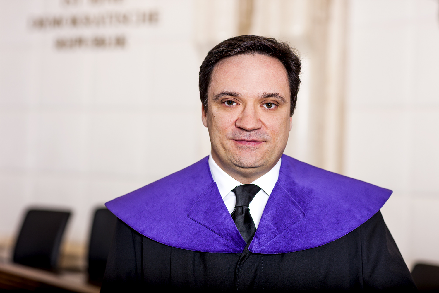 Dr. Nikolaus Bachler, Ersatzmitglied des österreichischen Verfassungsgerichtshofs seit 2009.